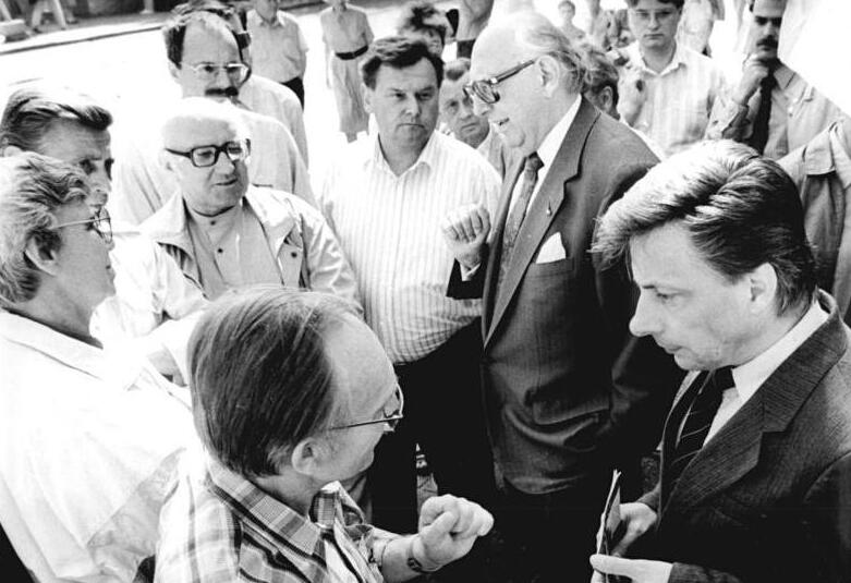 Dresden, Kommunalwahl, Wahlkampf, Mischnick, Ortleb ADN-Häßler 18 4.5.90 Dresden: Zu Straßenwählergesprächen in Vorbereitung der Kommunalwahlen trafen Politiker der Mitte, wie Wolfgang Mischnick (FDP-BRD M.) und Prof. Rainer Ortleb (BFD r.), mit Einwohnern der Elbestadt am Wasaplatz zusammen. Abgebildete Personen: Mischnick, Wolfgang: MdB, FDP-Fraktionsvorsitzender, Bundesvertriebenenminister, Bundesrepublik Deutschland Ortleb, Rainer Prof. Dr.: Vorsitzender der Liberal-Demokratischen Partei Deutschlands (LDPD), stellvertretender Vorsitzender der FDP, Minister für Bildung und Wissenschaft, Bundesrepublik Deutschland (GND 110094050)